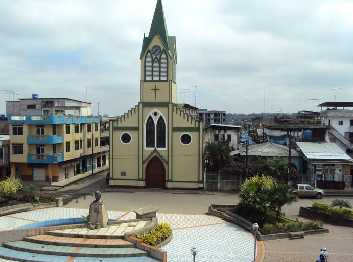 Montalvo (Ecuador)